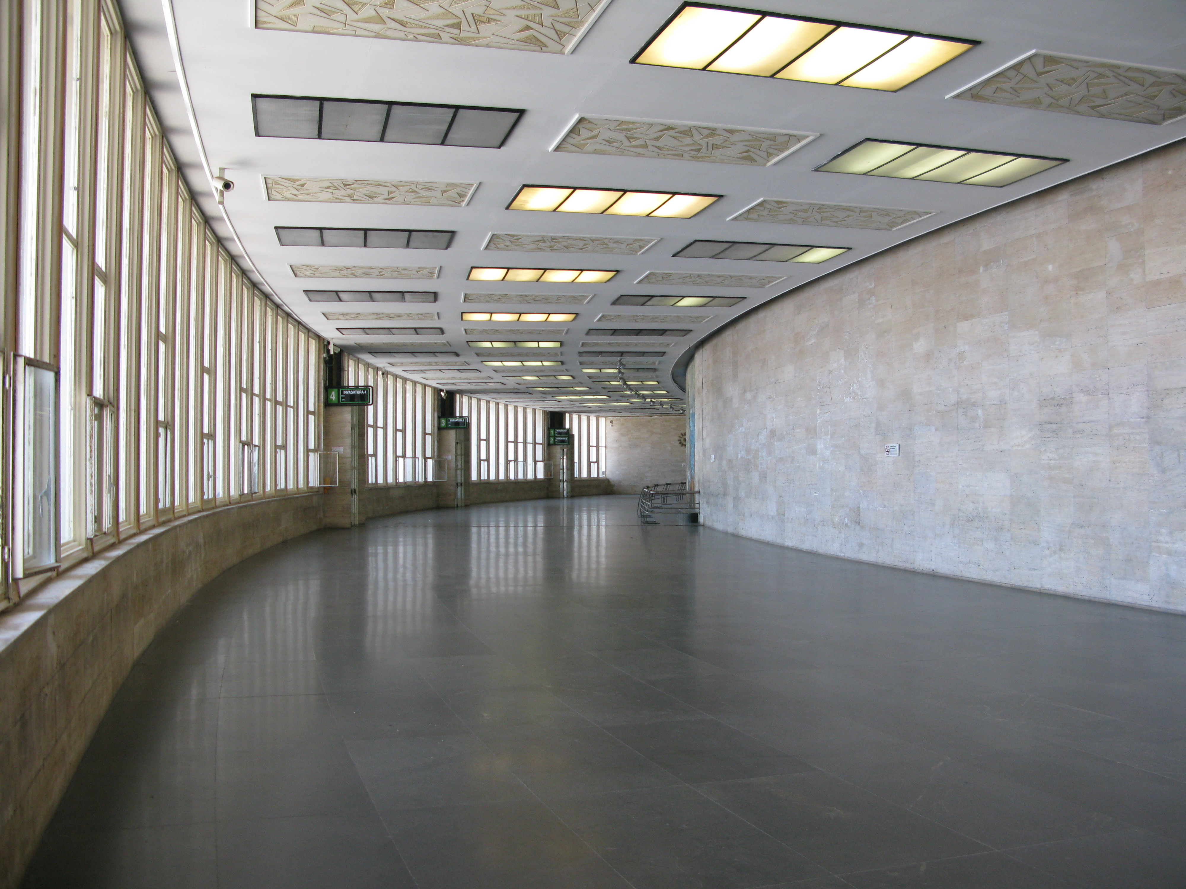 Salone dei Mosaici - Stazione di Messina Marittima - Messina Harbour, Italy